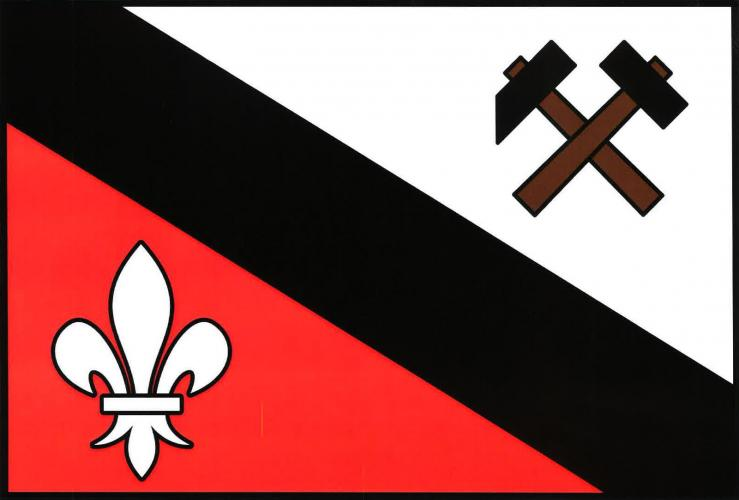 Louňová vlajka